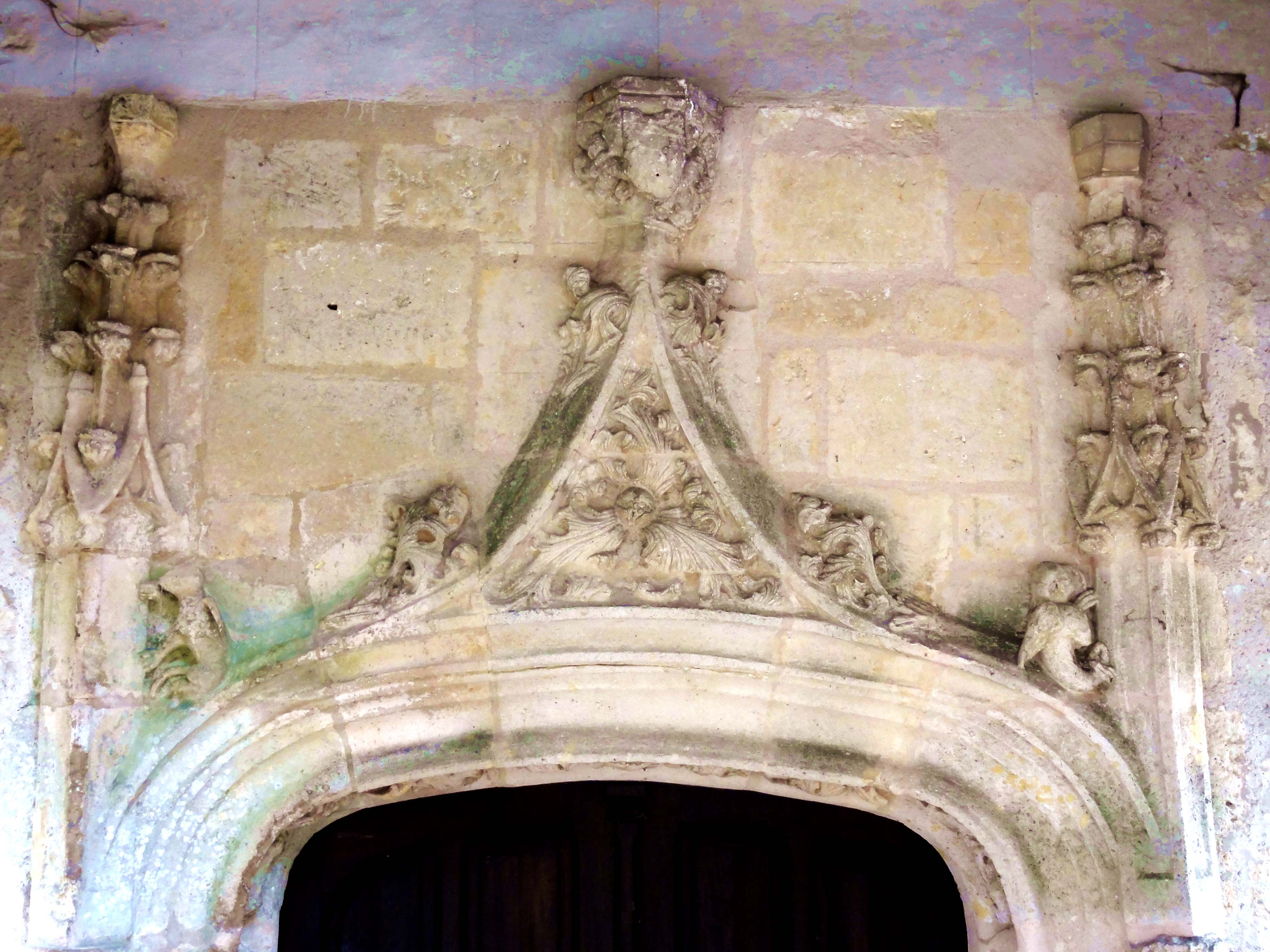 Église Saint-Georges de Ronquerolles - voir titre.